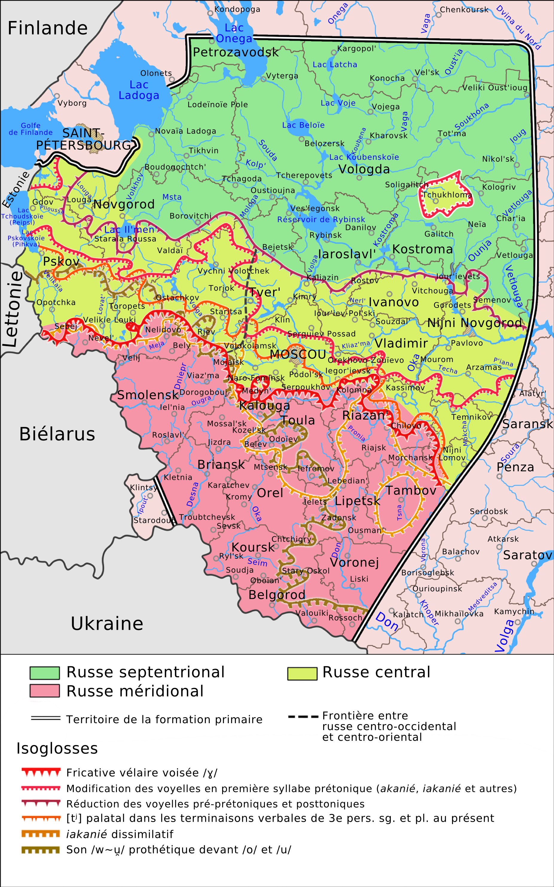 Dialectes russes avec les isoglosses principaux